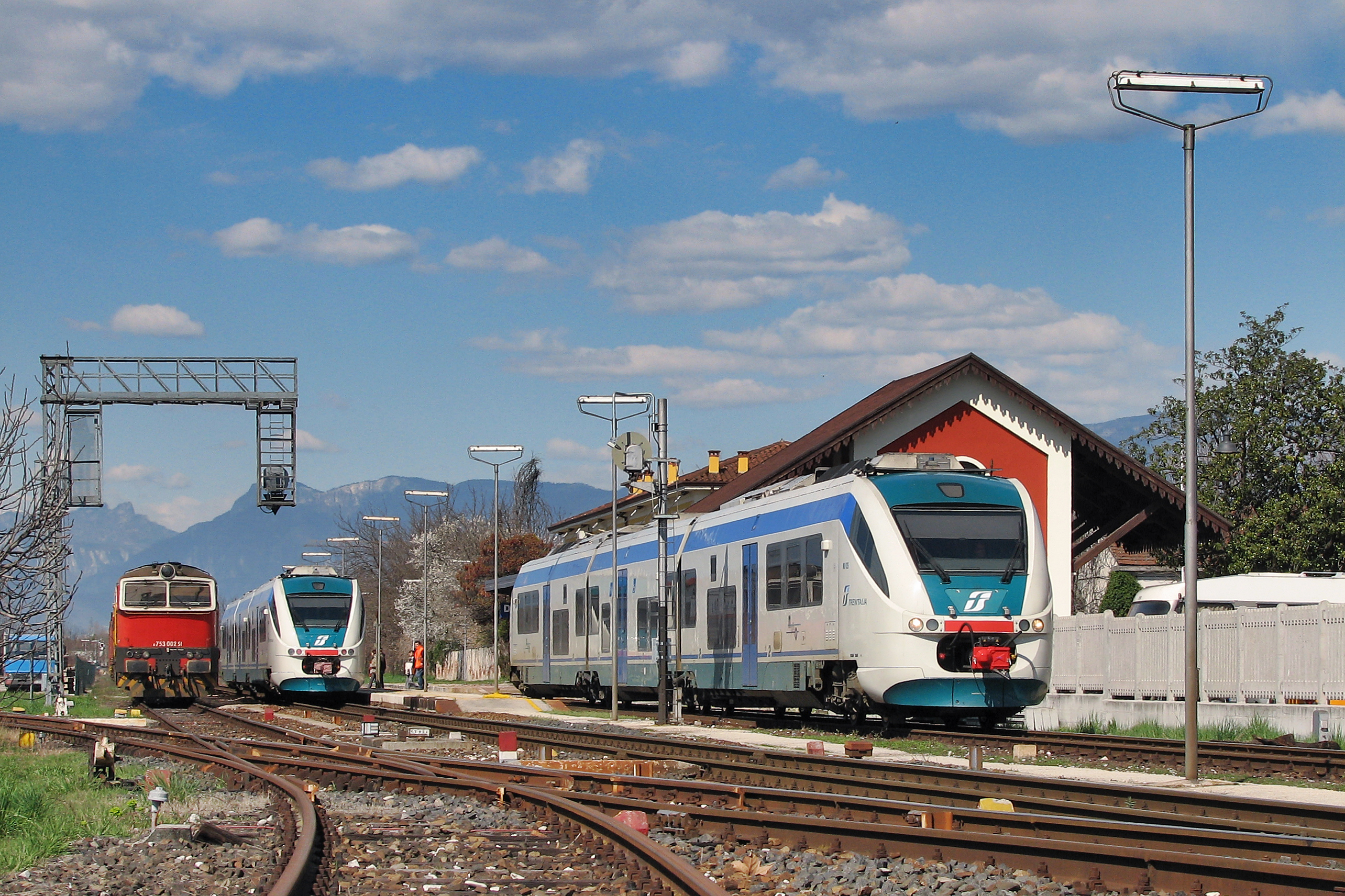 Due Minuetti Diesel si incrociano a Dueville mentre sul terzo binario sosta in attesa del via libera il merci per Vicenza.